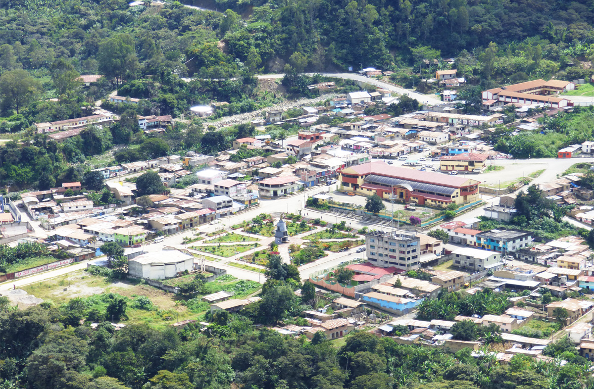 Centro poblado de huyro